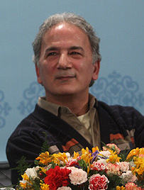 نشست خبری فیلم "نخلستان صابر" ۱۹ بهمن ۱۳۸۷ سینما فلسطین تهران